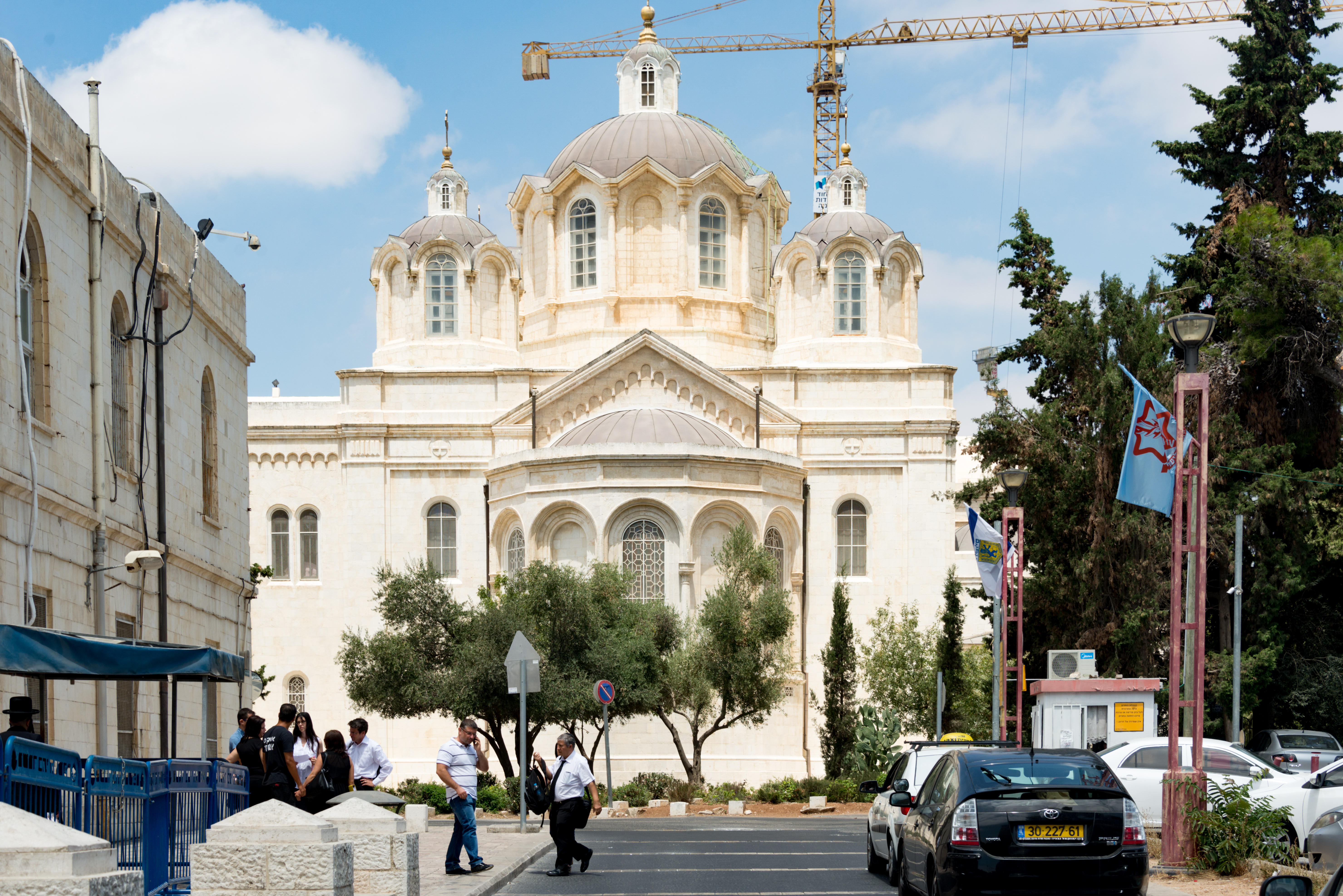 18576-Jerusalem Jerusalem